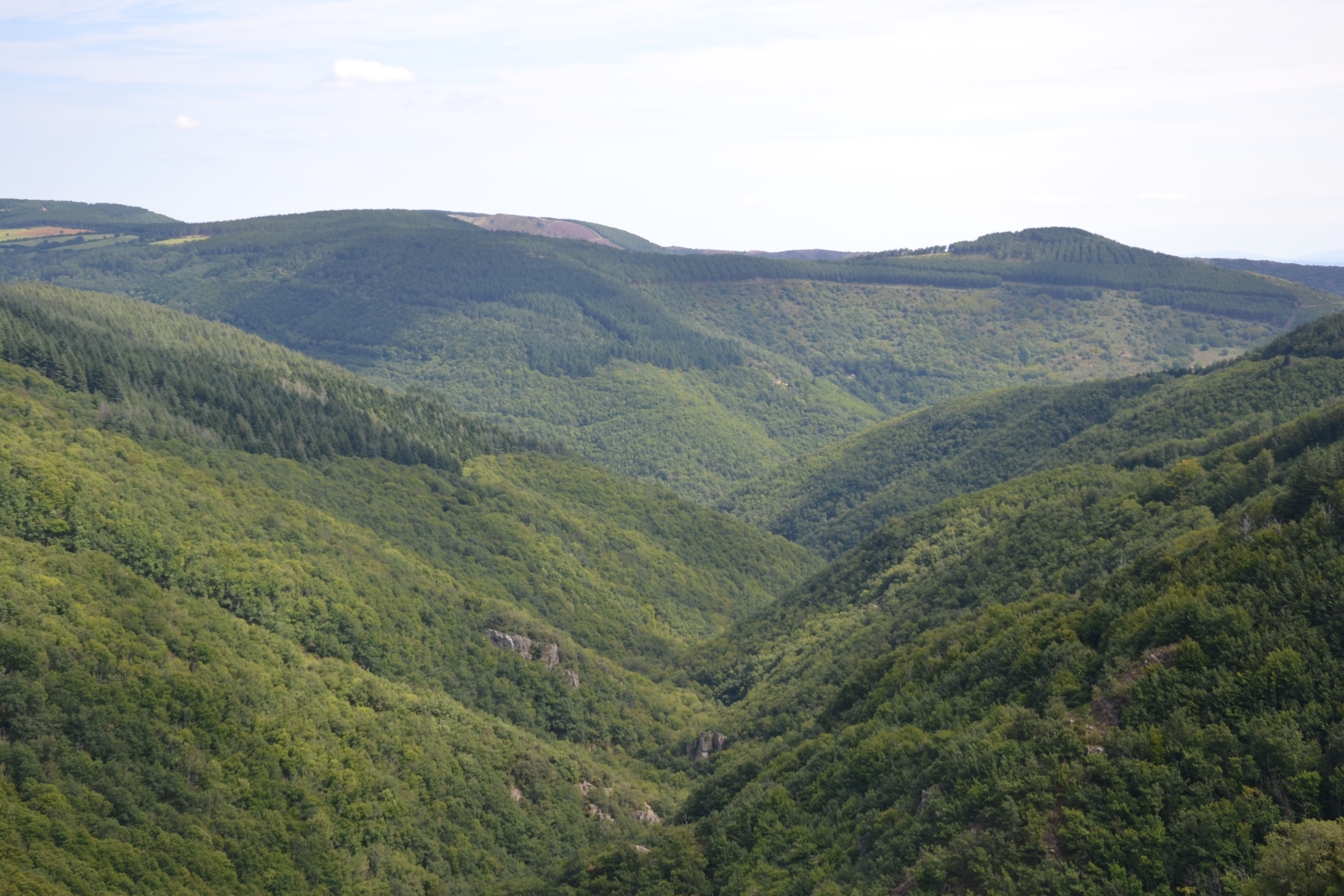 Haut Cabardès - Versants boisés de la vallée du Rieutort